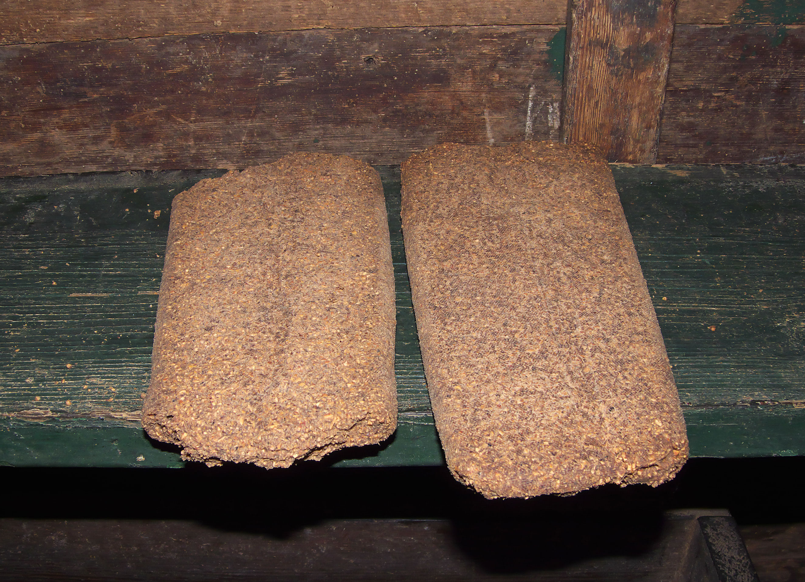 Molen De Passiebloem walnootkoeken